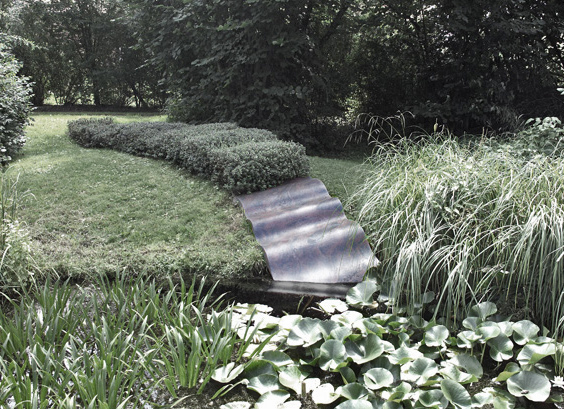 Monika Müller-Klug, Welle über Land, 2002, Alpenrose, Bararp Granit, Länge 850cm